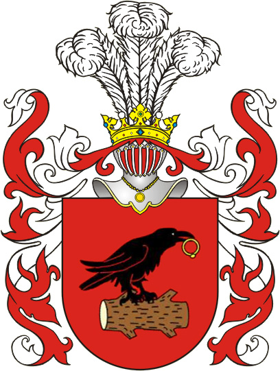 Herb Korwin Clan